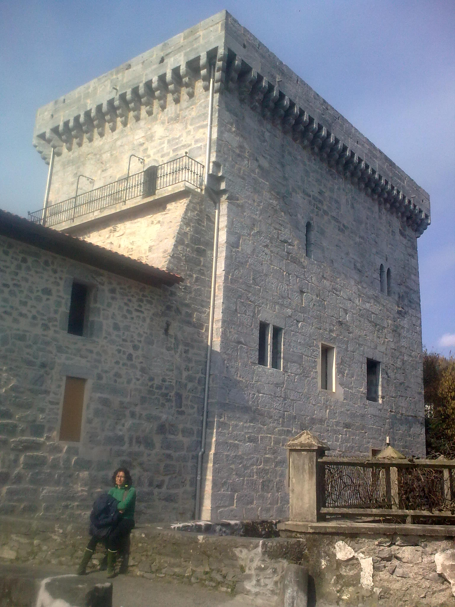 Zabaleta dorrea (Lesaka), XV. mendekoa.